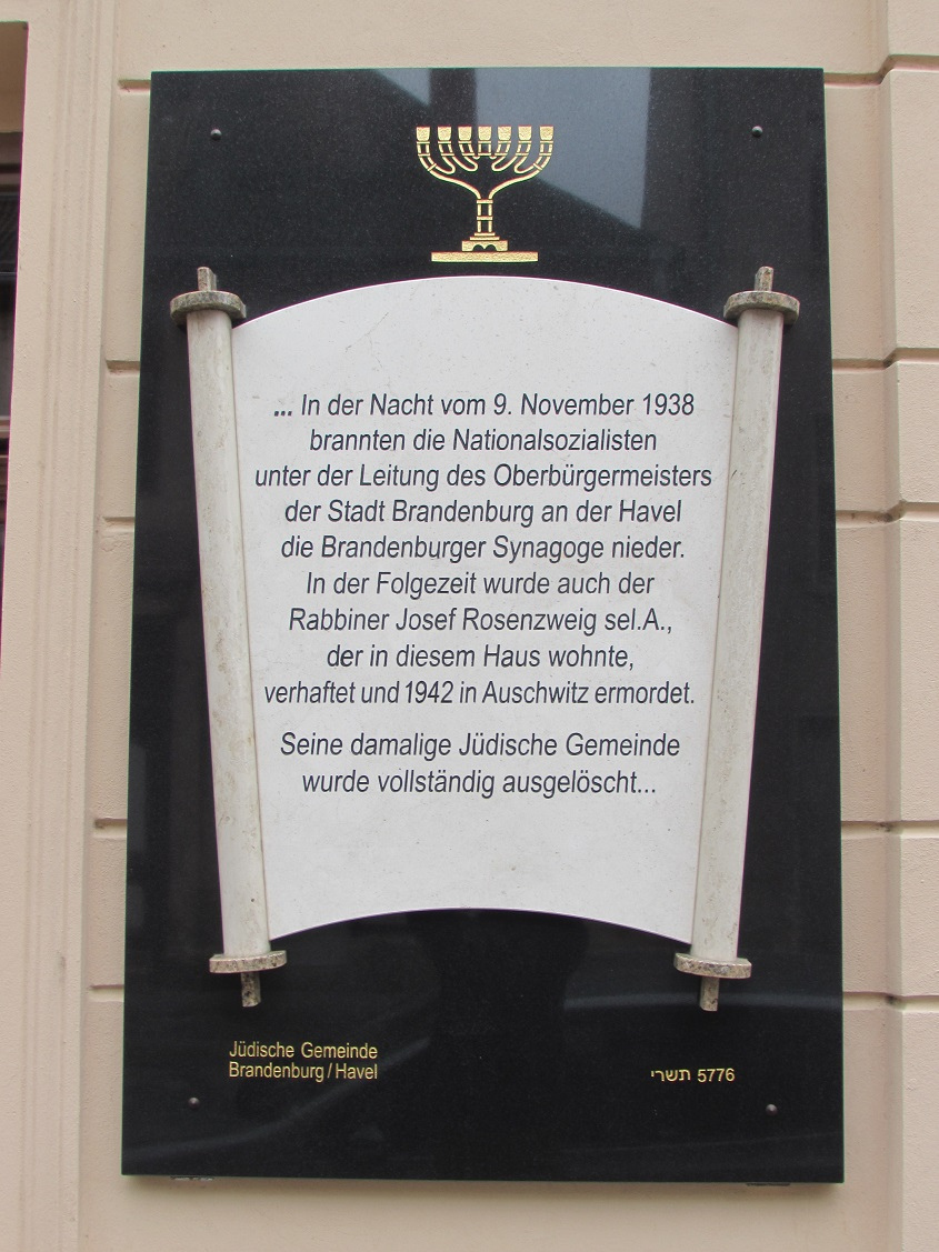 Gedenktafel; Jüdisches Gemeindehaus Brandenburg an der Havel